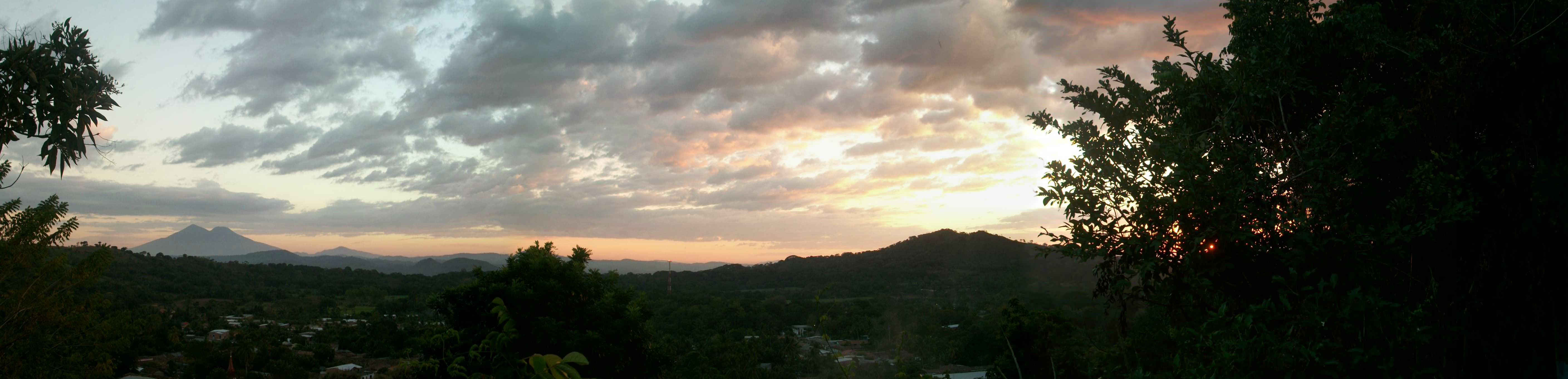 Panóramica de Tejutepeque © .